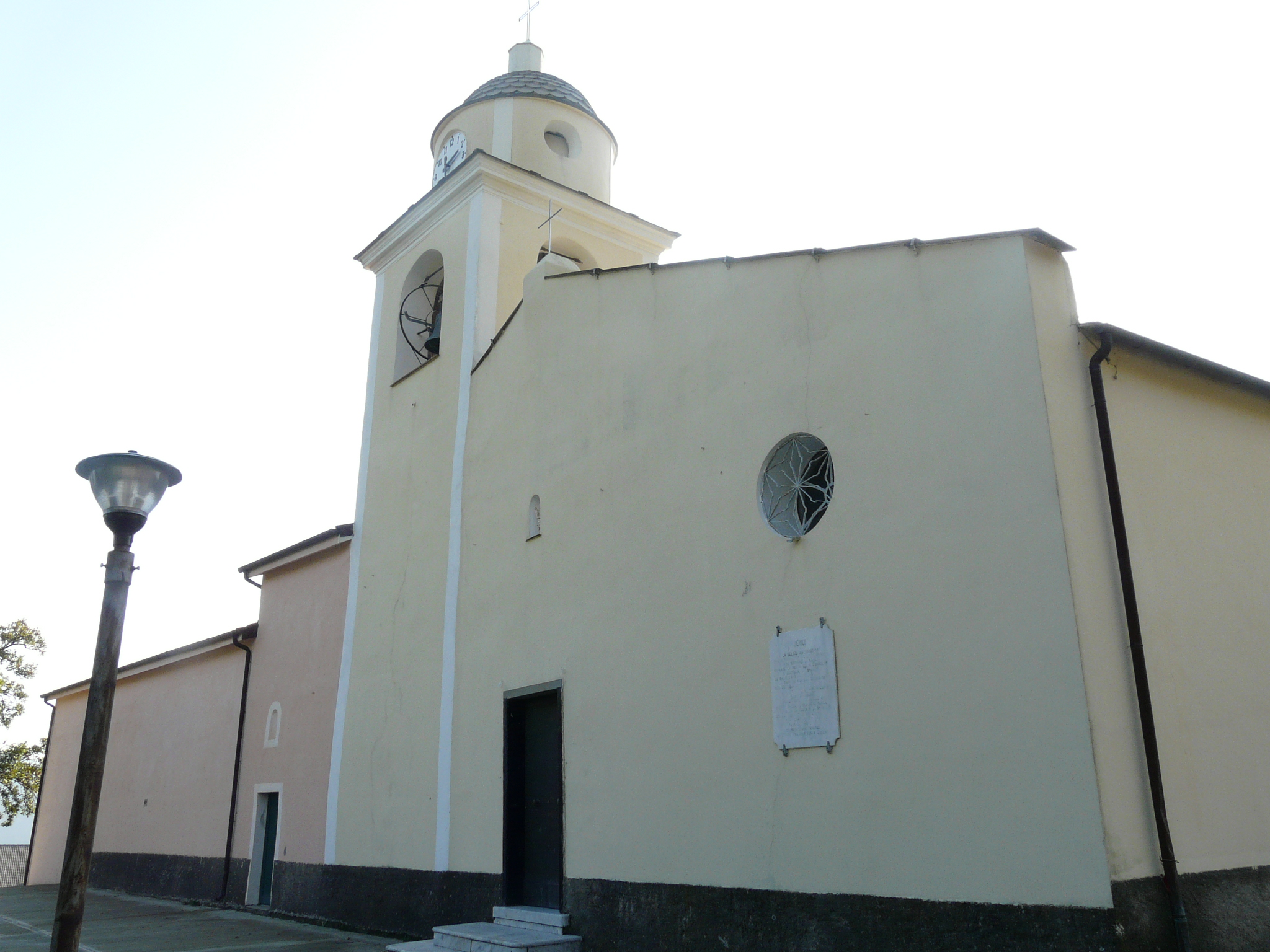 Chiesa di San Lorenzo, Verici, Casarza Ligure, Liguria, Italia